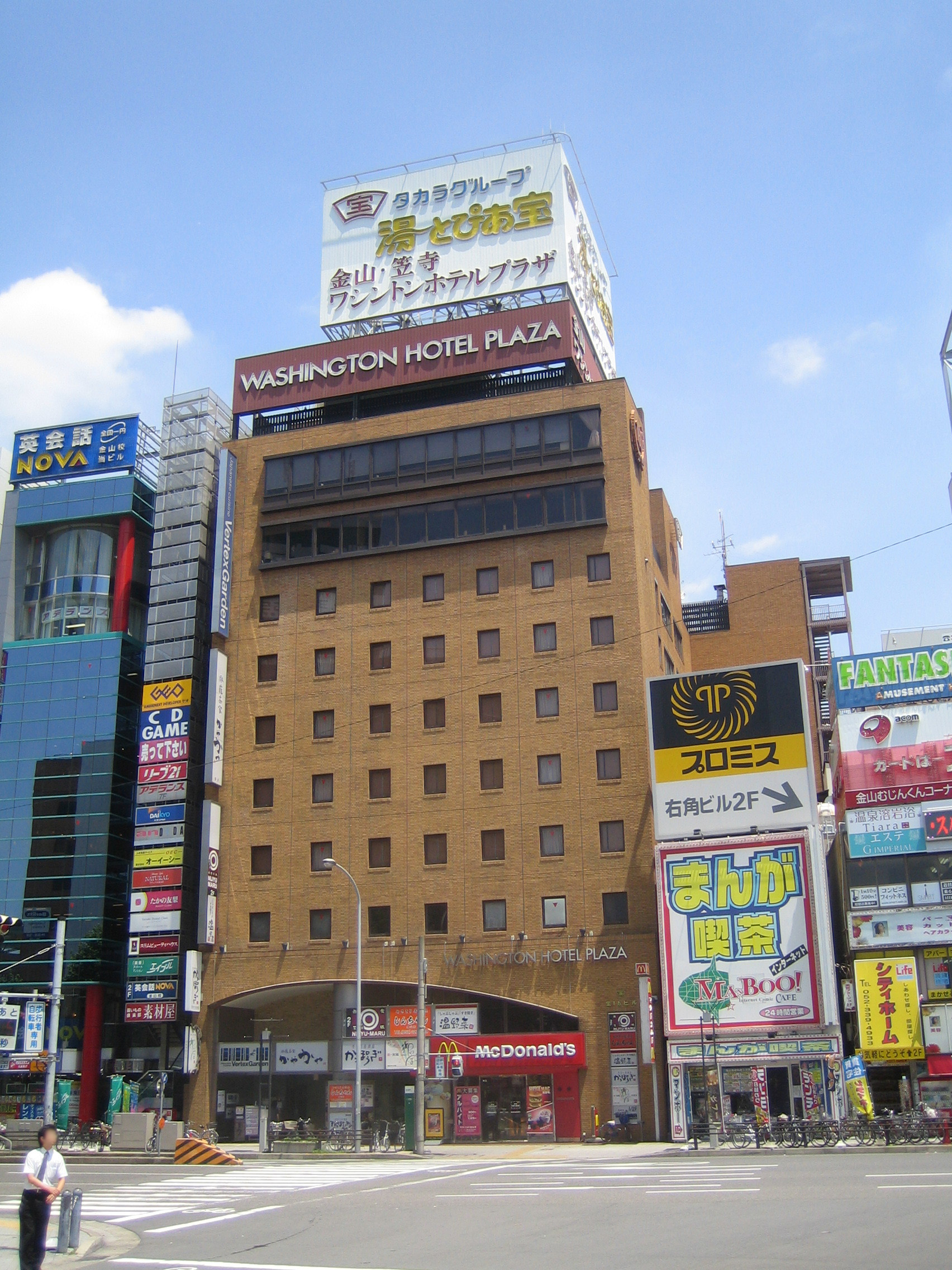 名古屋金山ワシントンホテルプラザ。愛知県名古屋市中区金山 Nagoya Kanayama Washington Hotel Plaza (名古屋金山ワシントンホテルプラザ), in Naka, Nagoya, Aichi|Nagoya, Aichi, Japan